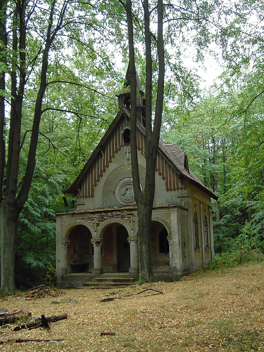 Kaple svatého Jáchyma na vrchu Jáchym u Lobendavy